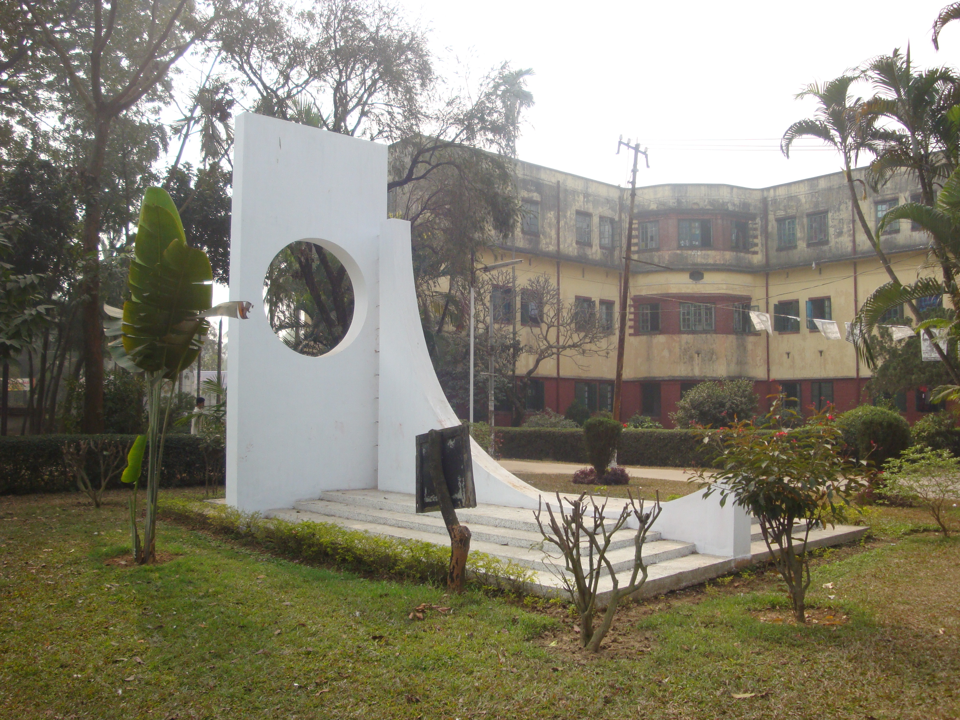 ২৫ শে মার্চ মধ্য রাতে জগন্নাথ হল,ঢা.বি. তে পাক বাহিনীর চালানো নির্মম হত্যাকান্ডের স্থান তথা বধ্যভূমি এবং স্মৃতিসৌধ